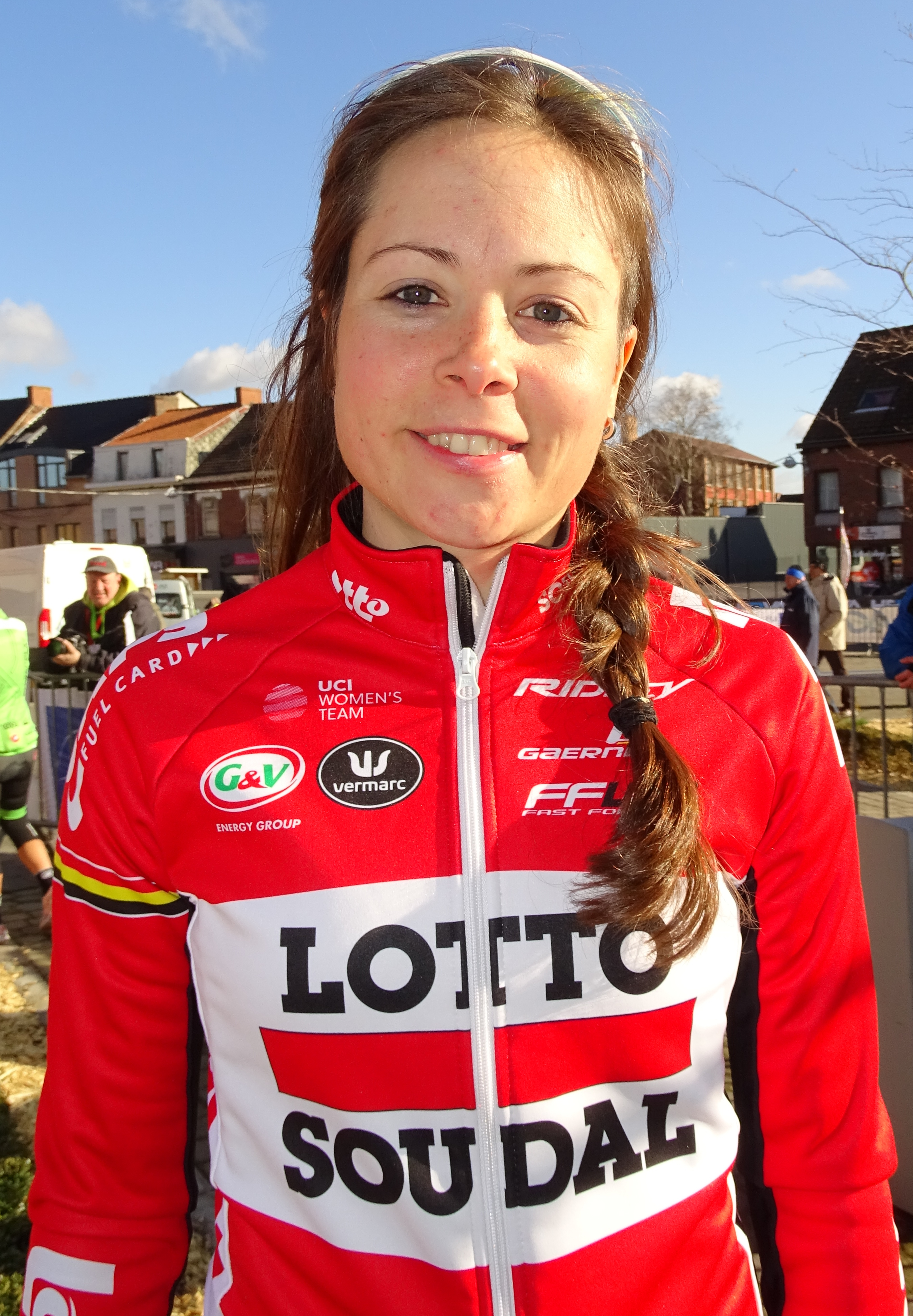 Reportage réalisé le mercredi 2 mars à l'occasion du départ du Samyn des Dames 2016 et du Samyn 2016 à Quaregnon, Belgique.